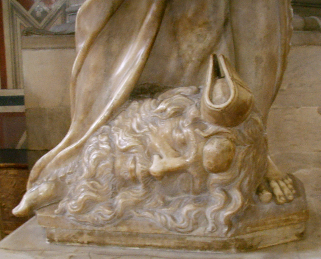 Donatello, david (marmo)